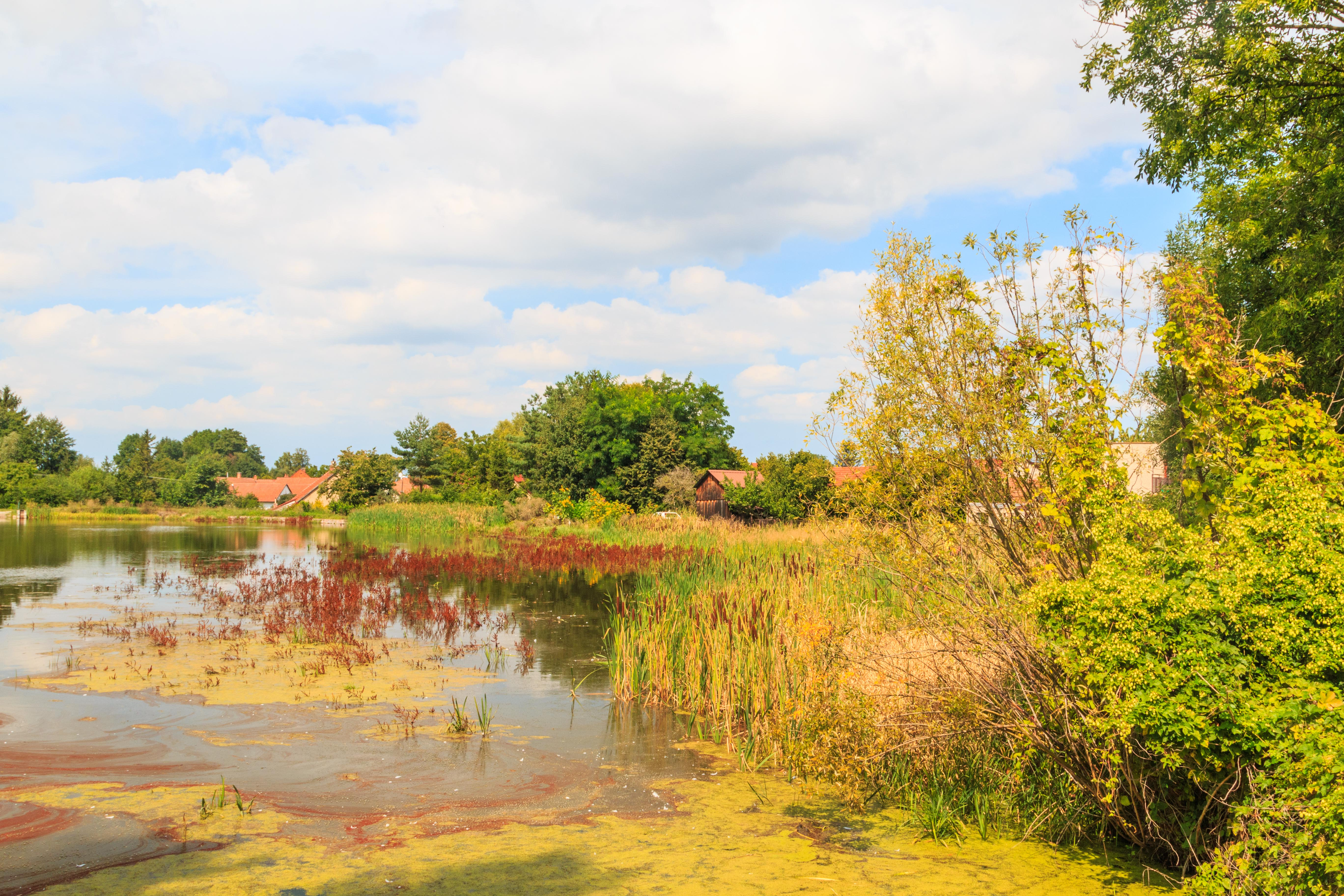 Tisovské návesní rybníky